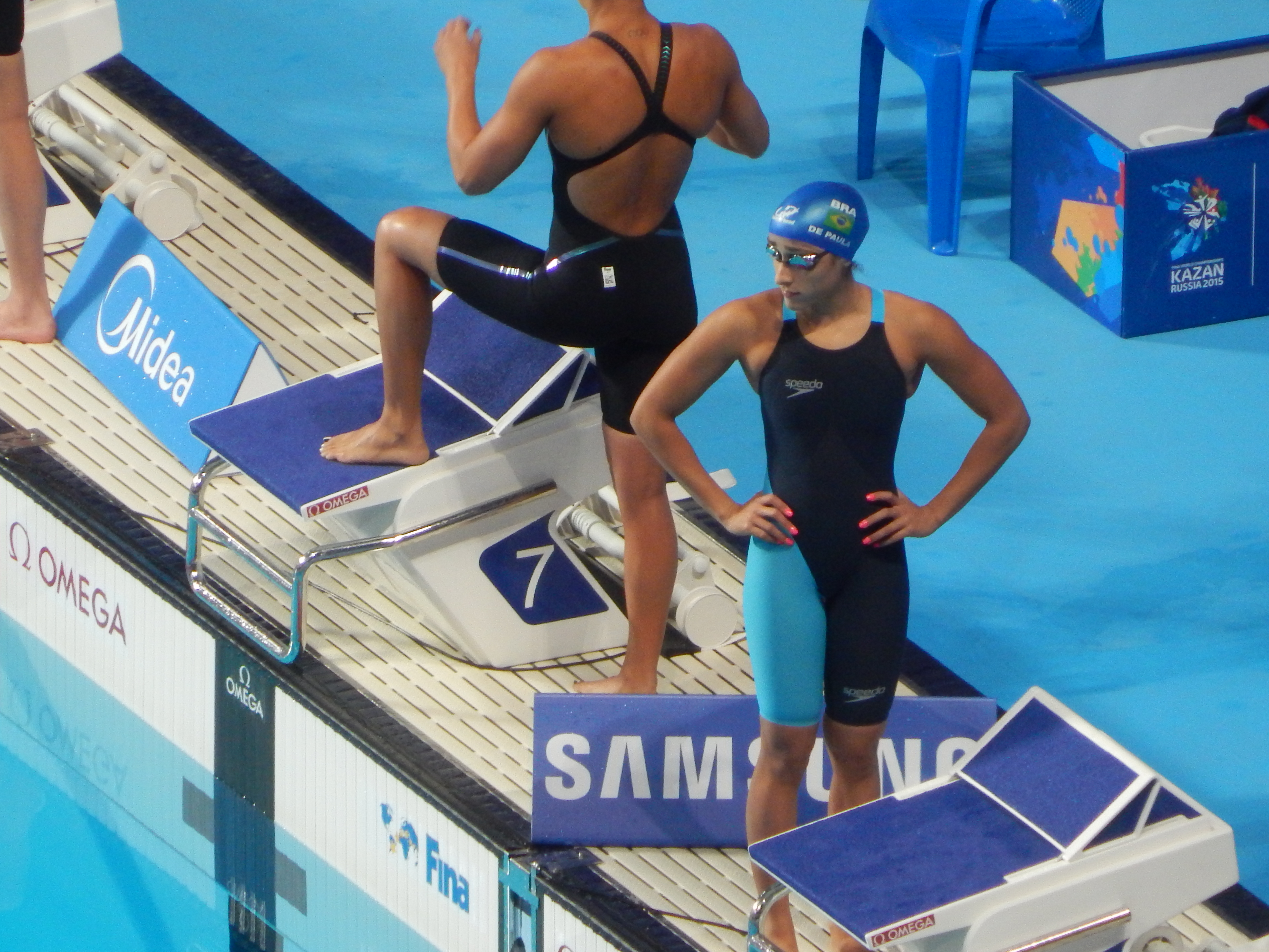 Заплыв на чемпионате мира в Казани баттерфляем 50 метров полуфинал